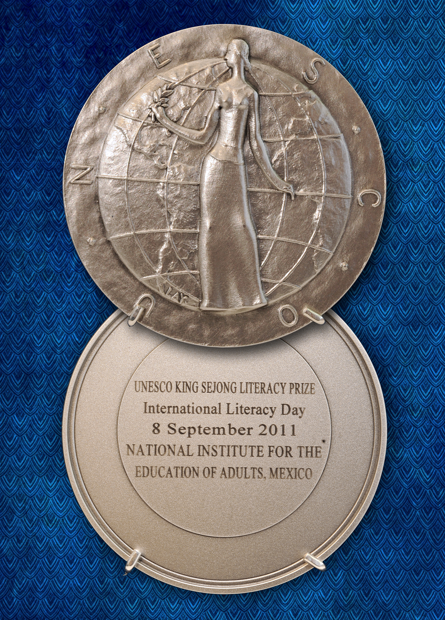 Para 2011, la Organización de las Naciones Unidas para la Educación, la Ciencia y la Cultura (UNESCO), otorgó al INEA el Premio Rey Sejong, por los programas de alfabetización bilingüe que ofrece a través del Modelo de Educación para la Vida y el Trabajo Indígena Bilingüe (MIB). Ese mismo año el Proyecto de Valoración Diagnóstica y el Registro Automatizado de Formación (RAF), fueron reconocidos con Mención Honorífica por el Consejo Nacional de Evaluación de la Política de Desarrollo Social (Coneval).